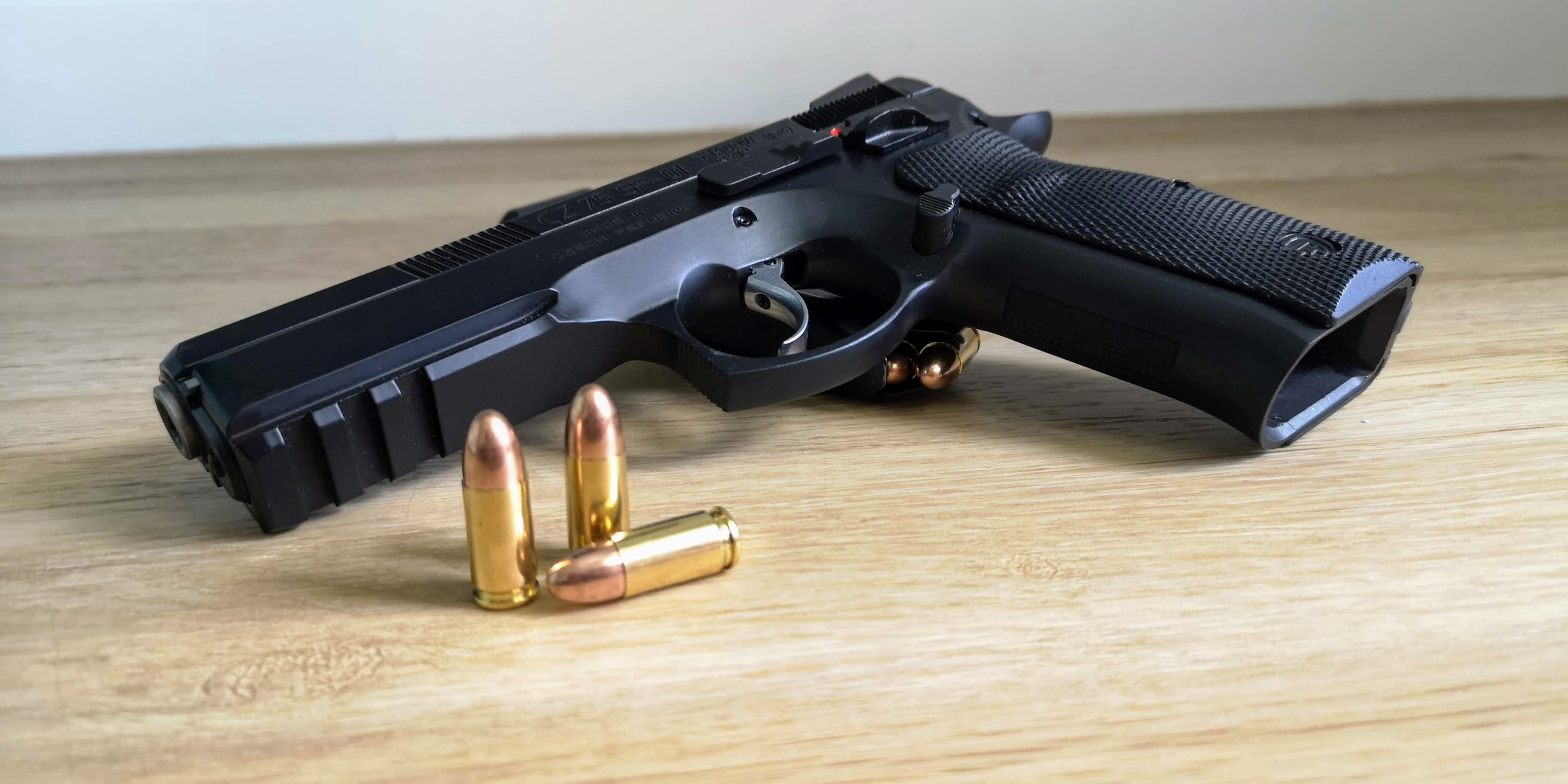 Pistolet CZ 75 SP-01 Shadow (rok produkcji 2019) oparty o załadowany magazynek wraz z nabojami 9x19 mm Para FMJ